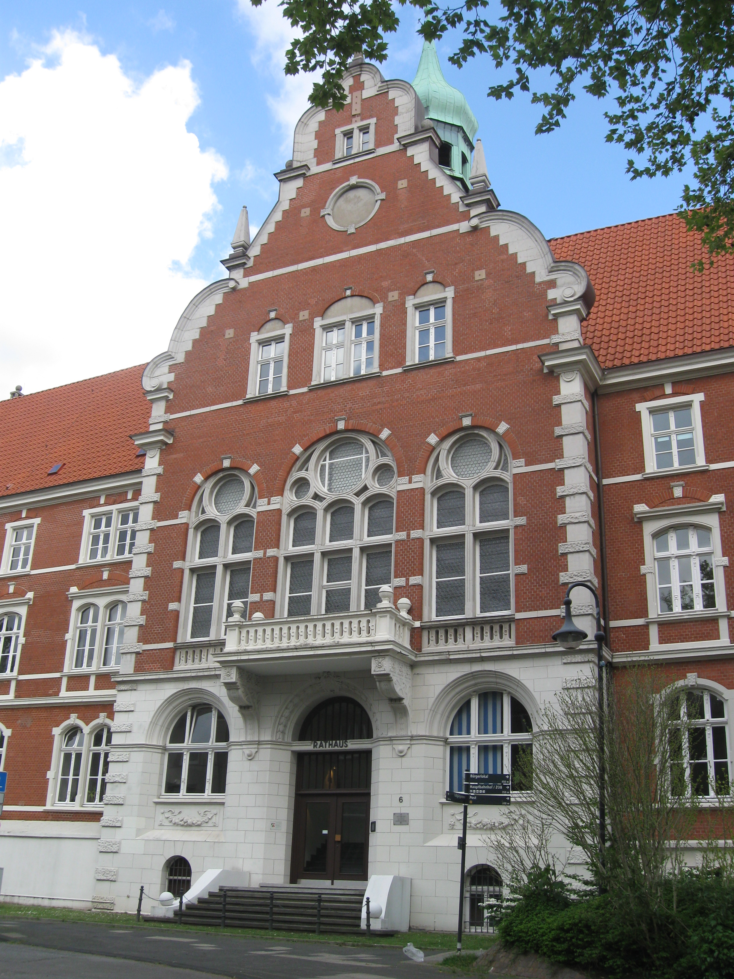 Herne, Rathaus Wanne, Nordwestfront (Hauptportal); Baudenkmal in Herne-Wanne, Rathausplatz 6